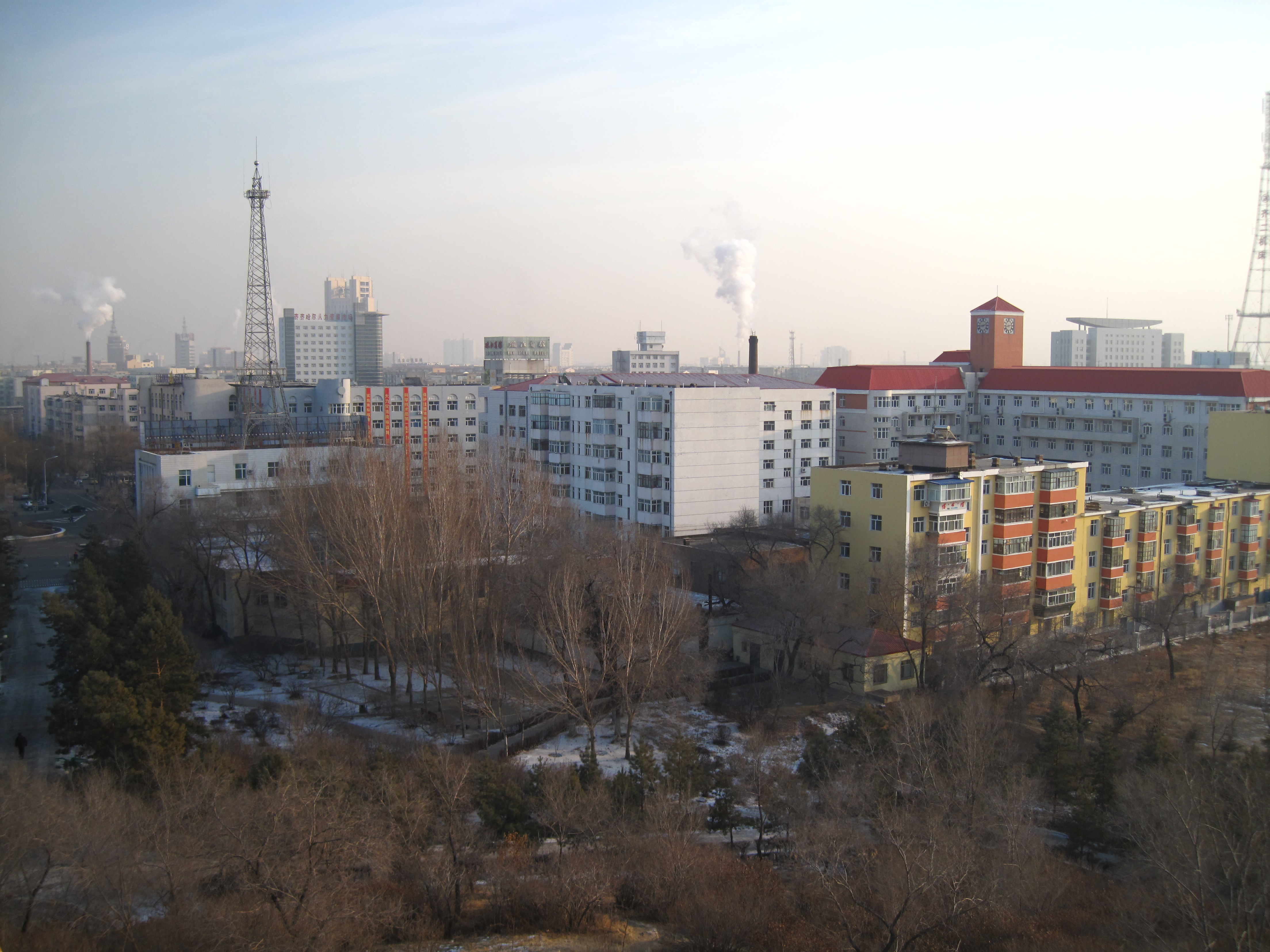 齐齐哈尔天际线，摄于龙沙公园。